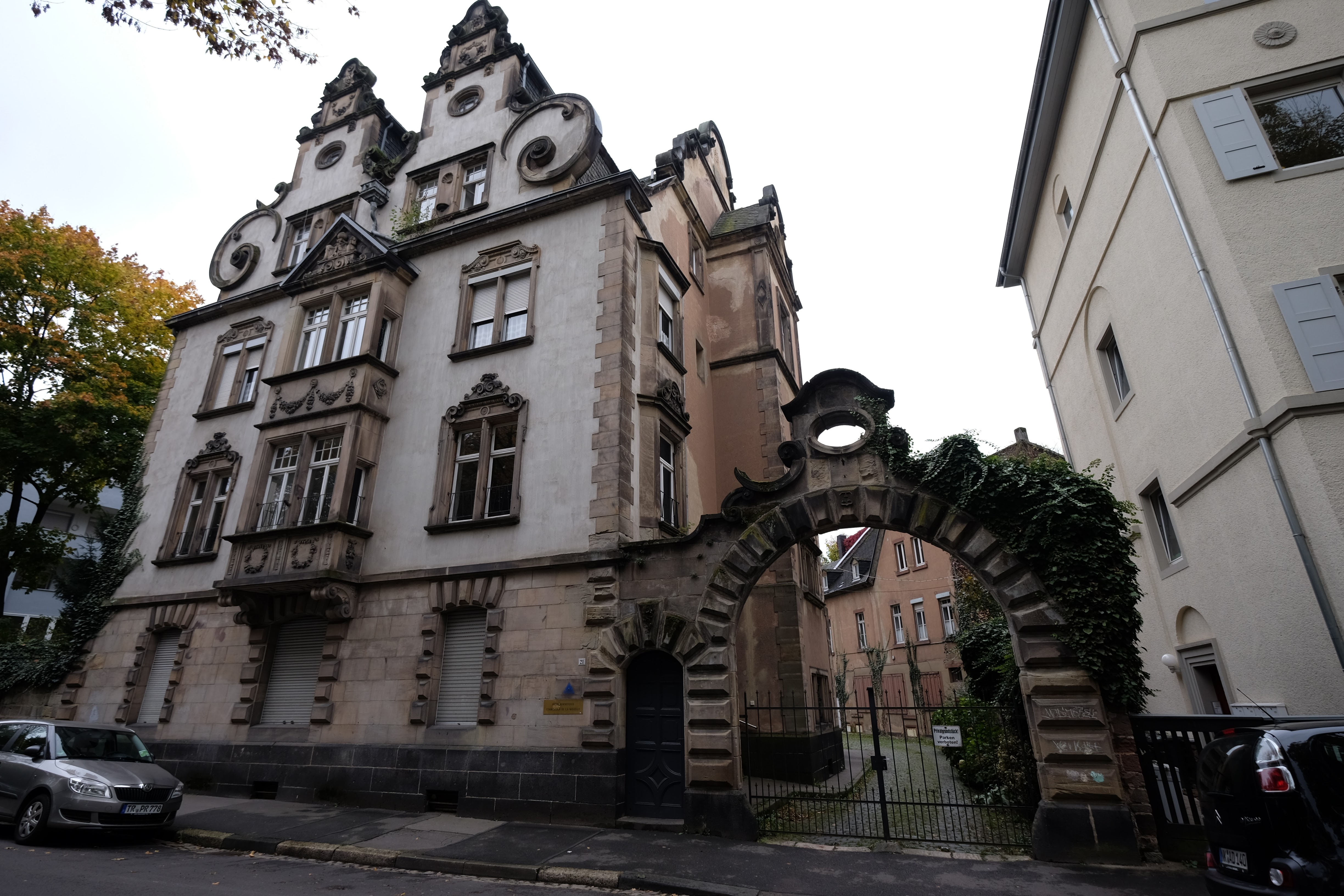 Franz-Ludwig-Straße 21, Trier; das Gebäude ist der Sitz der Moselkommission und ein Kulturdenkmal.